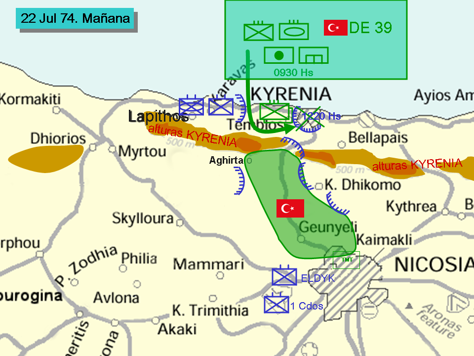 Situacion de las fuerzas el 22 Jul 74 en horas de la mañana